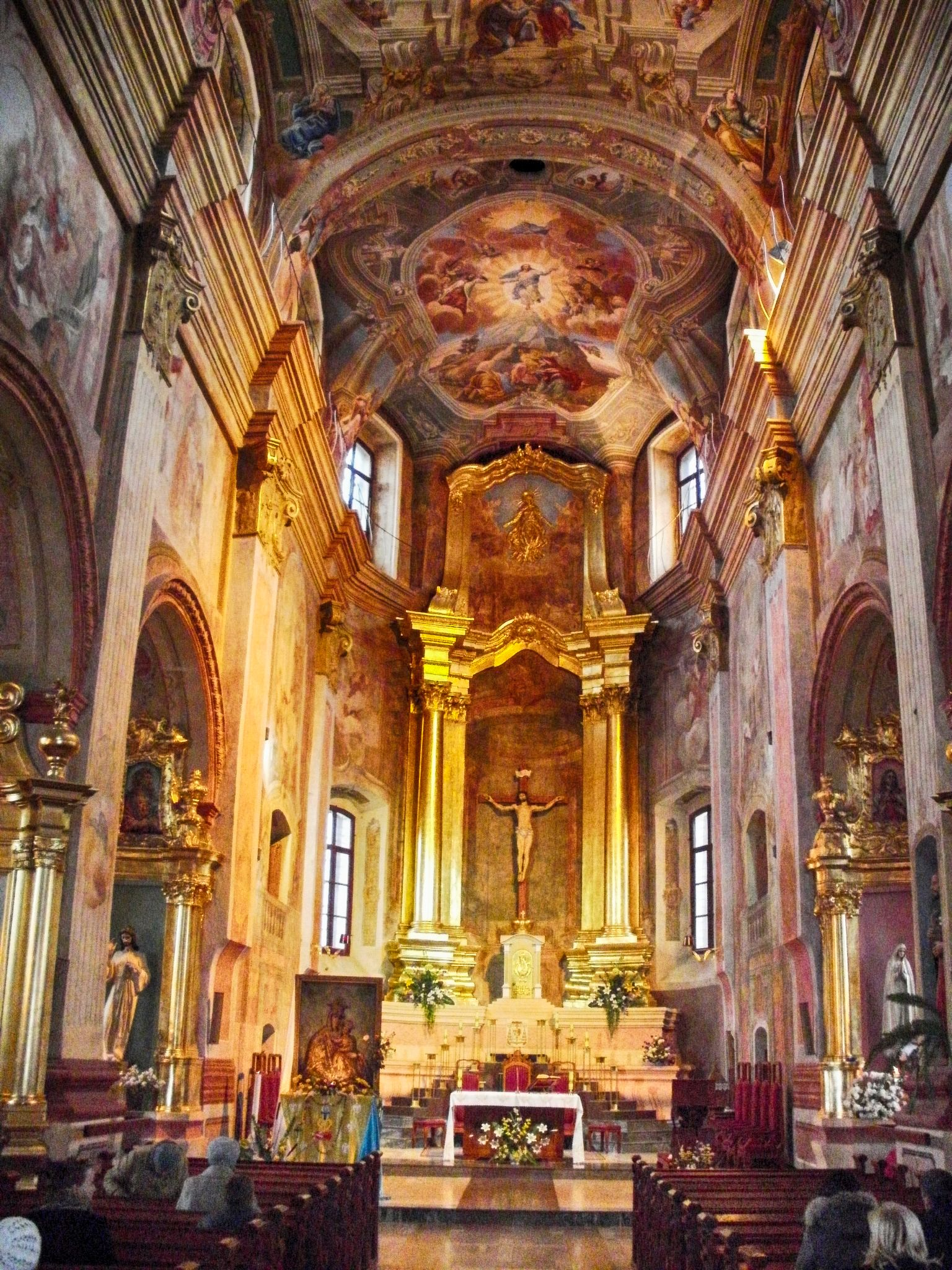 Беларуская (тарашкевіца): Комплекс былога кармеліцкага кляштара: касьцёл Св. Станіслава (Унебаўзяцьця Найсьвяцейшай Дзевы Марыі) з пляба- ніяй і росьпісам у інтэр’еры касьцёла; тэрыторыя комплексу: з паўднёвага боку абмежаваная існуючай падпорнай сьцяной, якая ўключае праезд ад чырвонай лініі забудовы да перадкасьцельнай плошчы, і далей на ўсход ад падпорнай сьцяны перадкасьцельнай плошчы ўмоўнай лініяй, паралельнай вул. Камса- мольскай (55 м на поўнач ад чырвонай лініі забудовы вул. Камсамольскай); з усходняга боку абмежаваная ўмоўнай лініяй, паралельнай вул. Ленінскай (50,5 м на захад ад чырвонай лініі забудовы, арыентаванай па дамах № 16, 20 па вул. Ленінскай); з паўночнага боку абмежаваная ўмоўнай лініяй, паралельнай падпорнай сьцяне (46,2 м на поўдзень ад чырвонай лініі забудовы (ад дома К. Лібкнехта, 7); з заходняга боку абмежаваная ўмоўнай лініяй у створы існуючай падпорнай сьцяны. г. Магілёў This is a photo of Belarusian heritage monument. Reference number: 512Г000020 ( WLM)